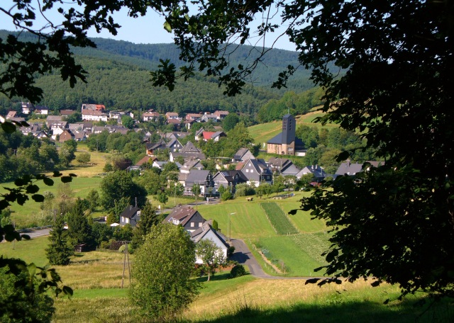 Blick auf Walpersdorf